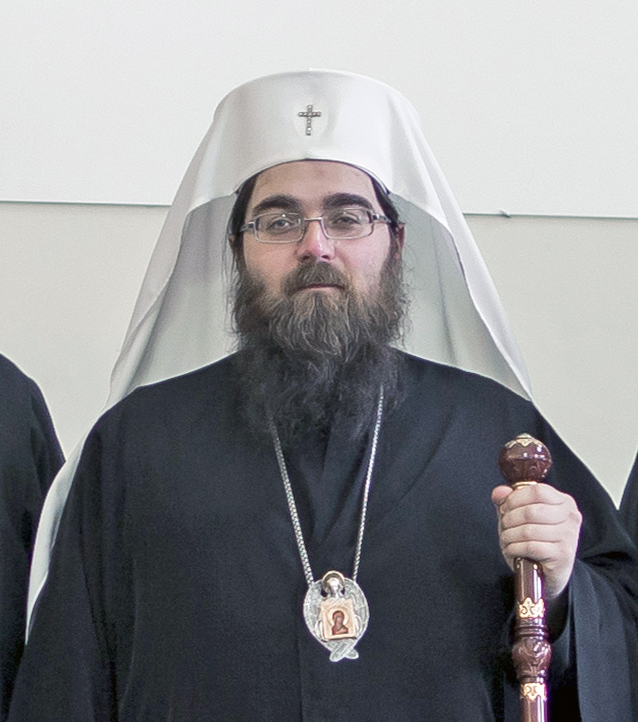 1 сентября 2016, Актовый день / 1 September 2016, Assembly day